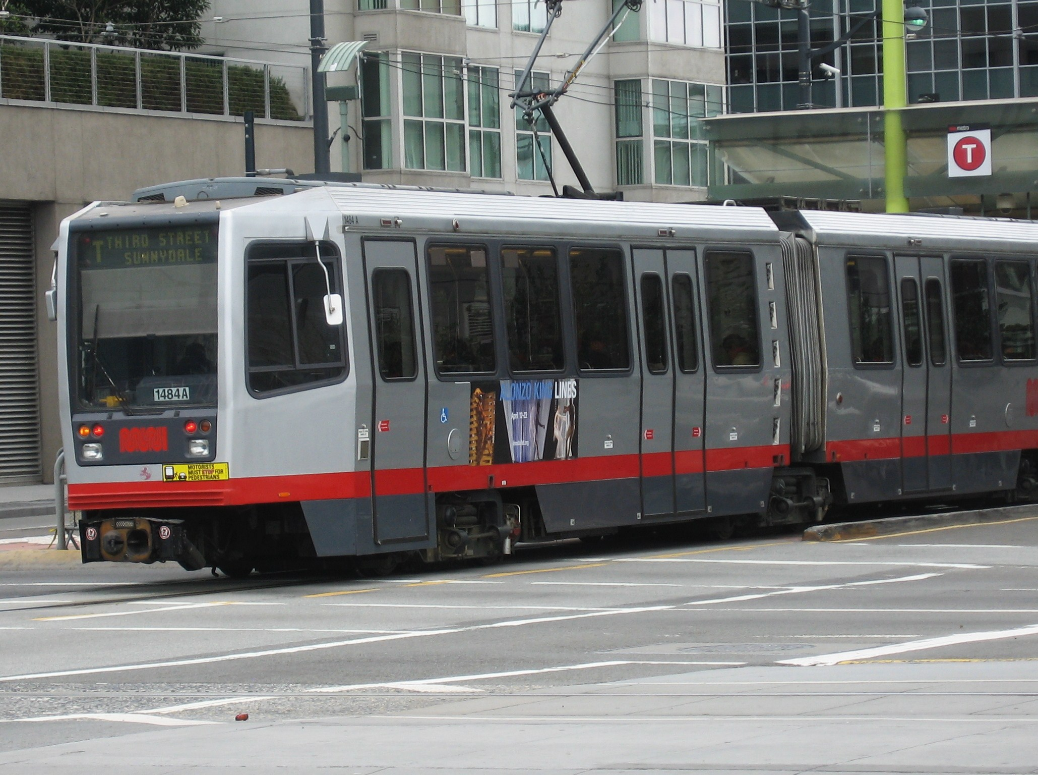 Project 365/72